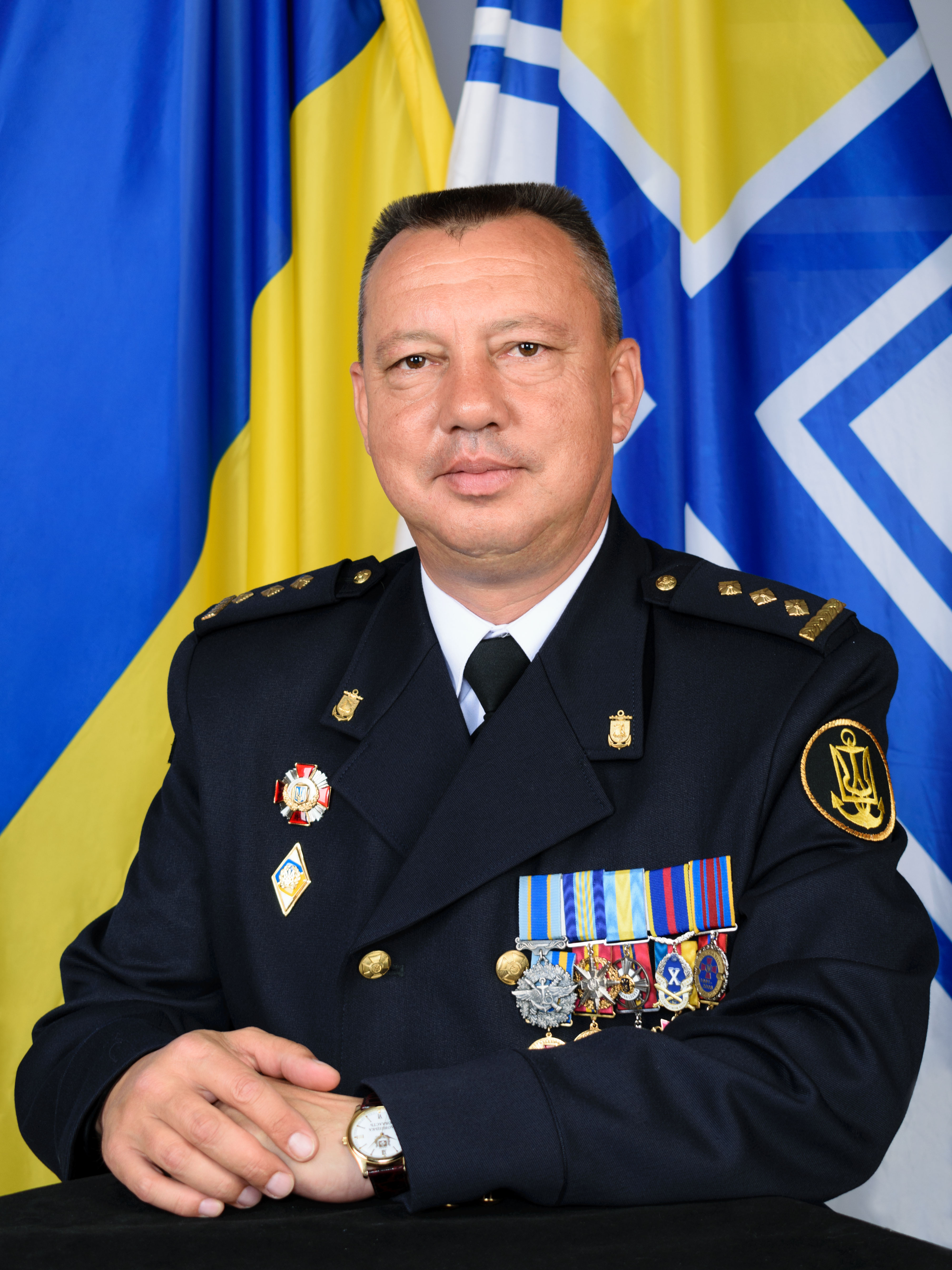 Полковник Пасічник Сергій Васильович